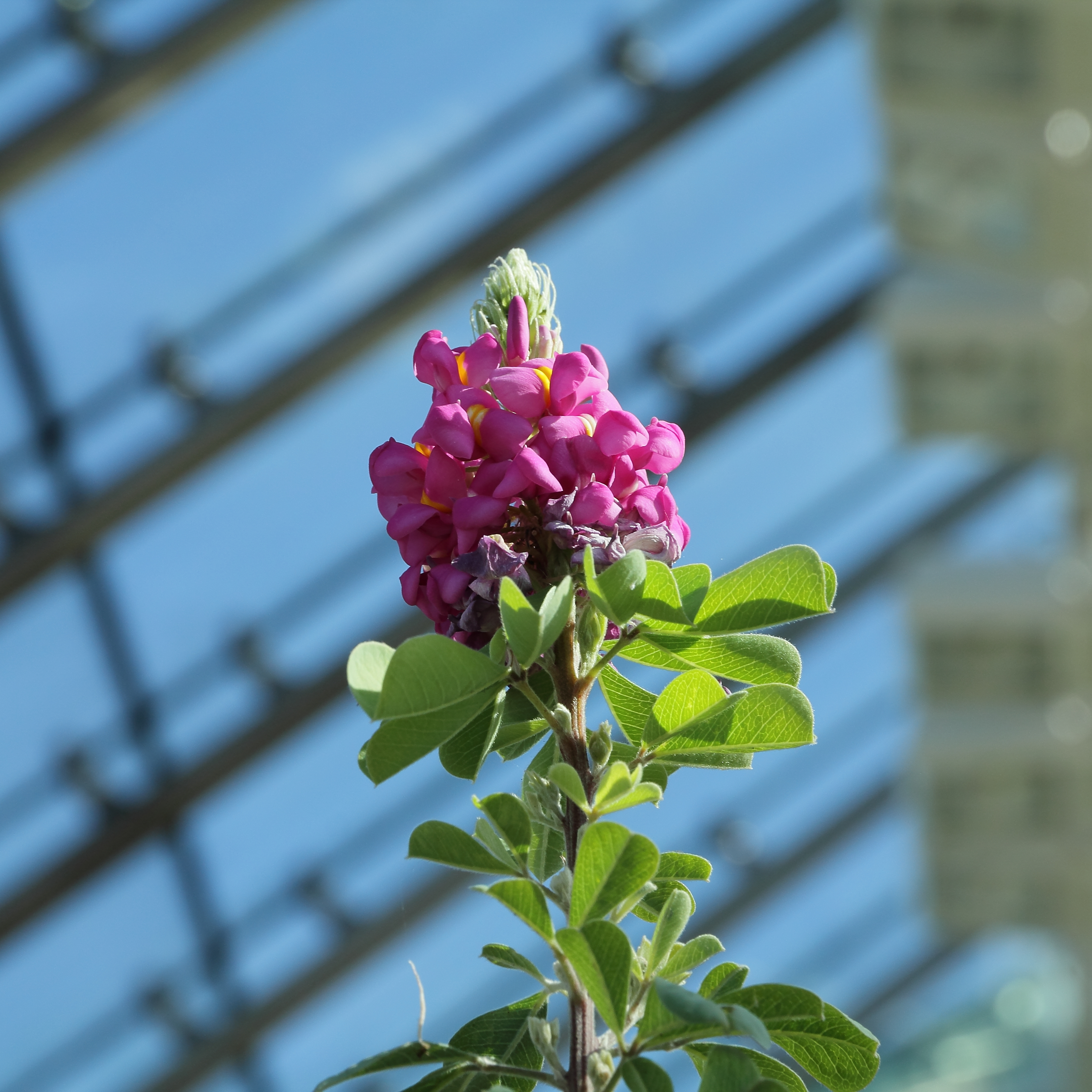 Hypocalyptus sophoroides i Bergianska trädgården.